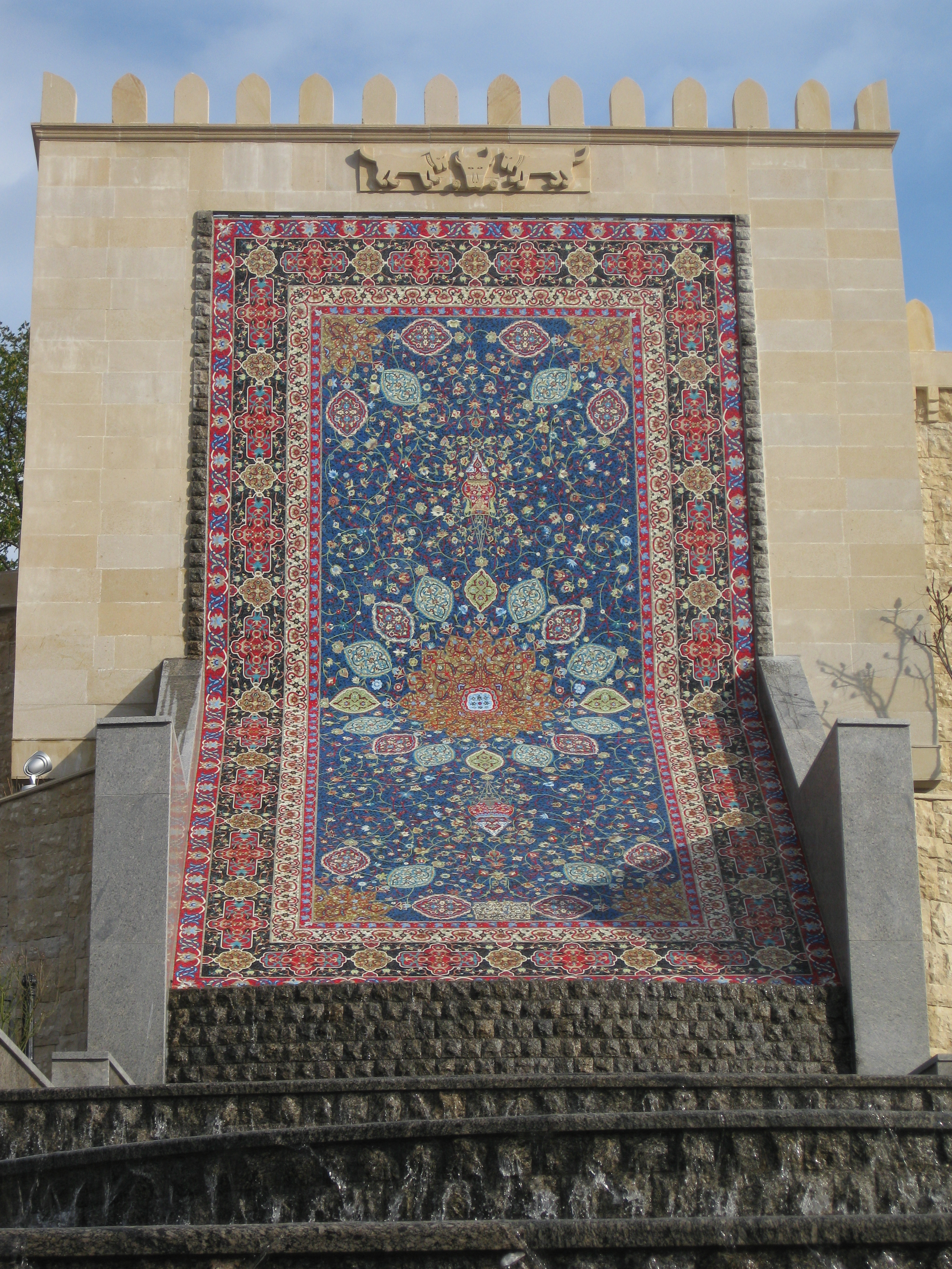 Парк имени Гейдара Алиева. Мозаичная копия ковра "Шейх Сафи" (в натуральную величину- 5,34х10,51 м)